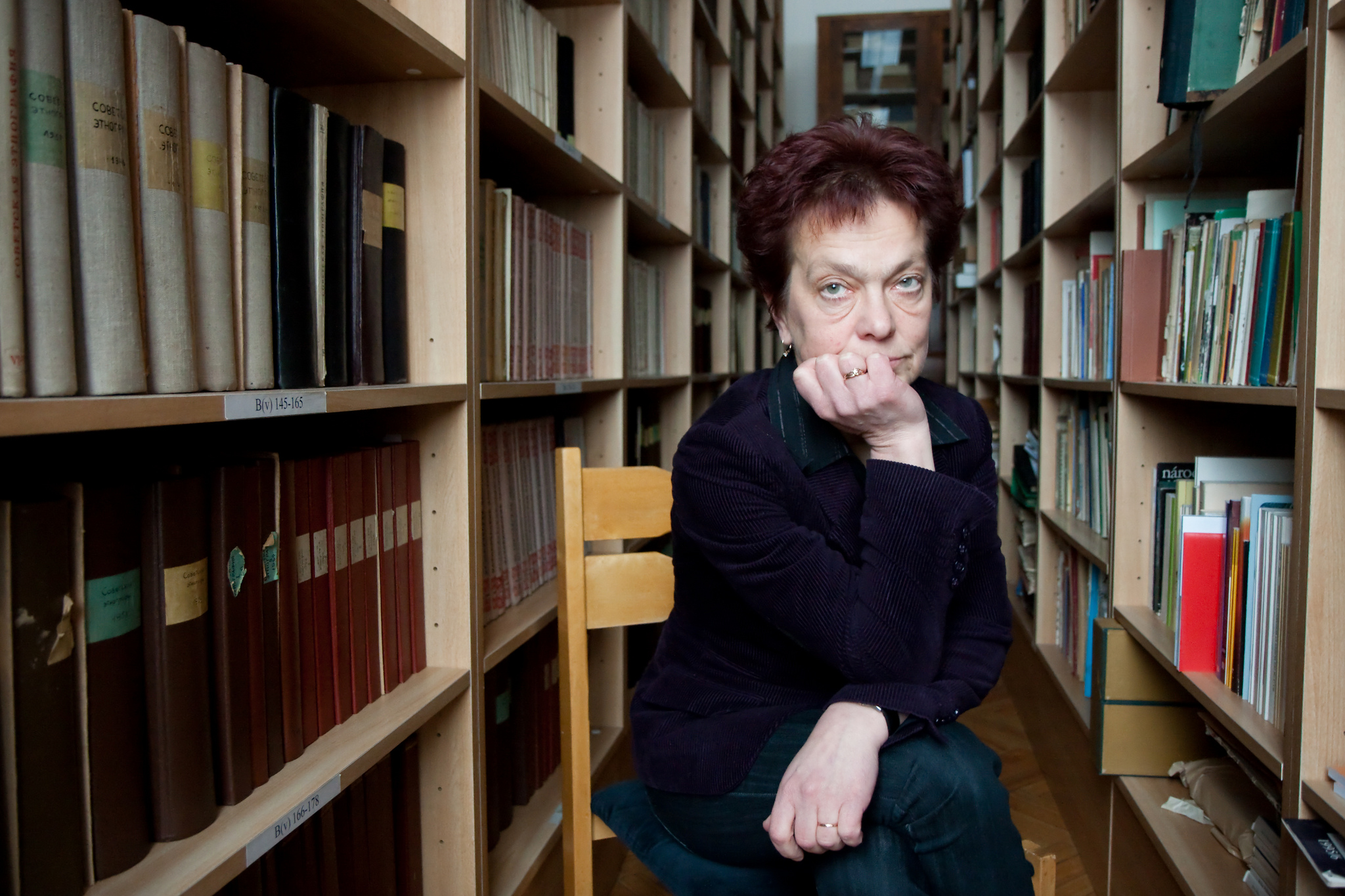 Muuseumidirektor Krista Aru Eesti Rahva Muuseumi peamajas.